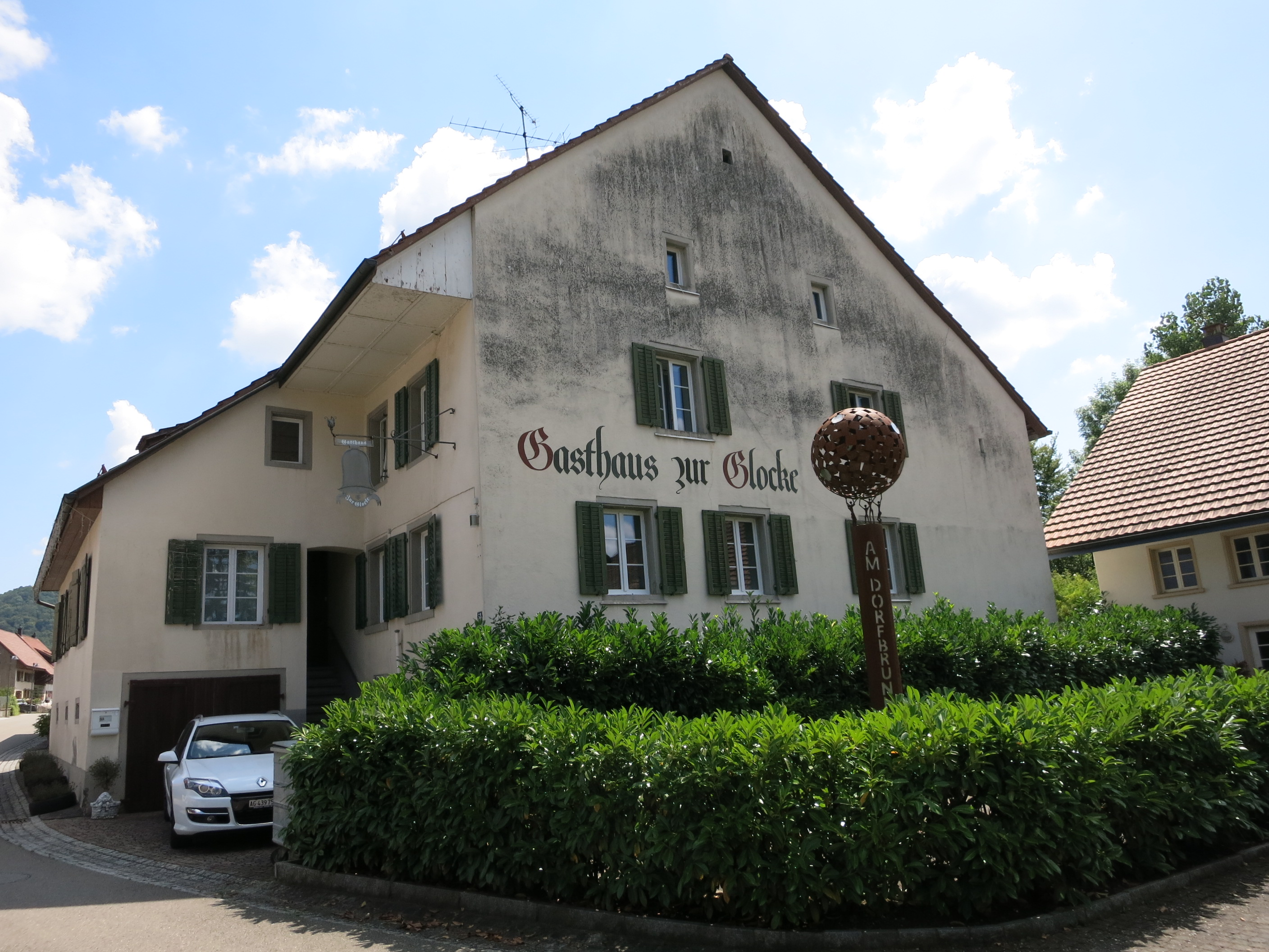 Gasthaus, Effingen AG, Schweiz, um 1700: Tavernenrecht seit 14. Jahrhundert